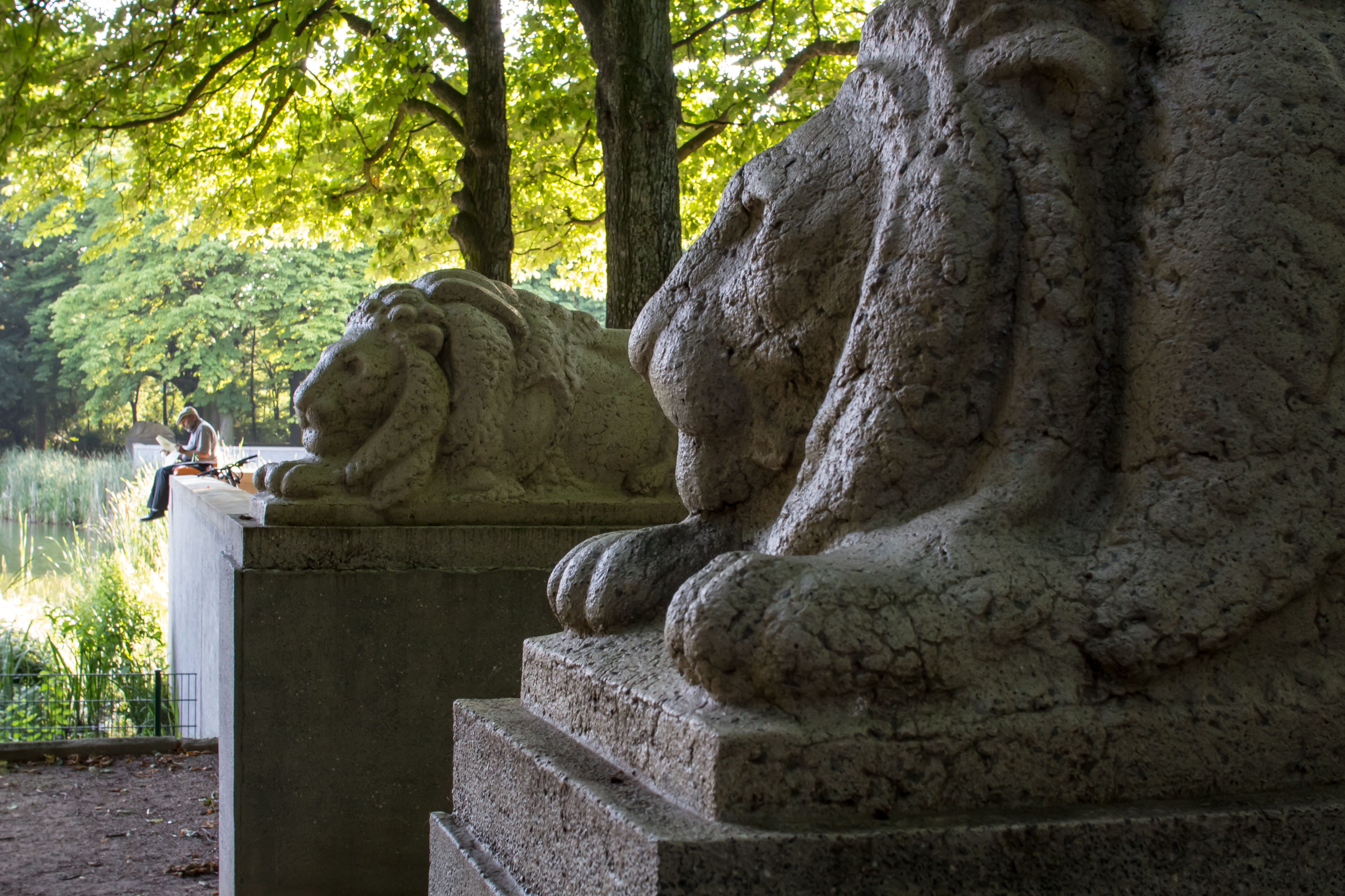 Löwenskulpturen im Blücherpark, Köln-Bilderstöckchen